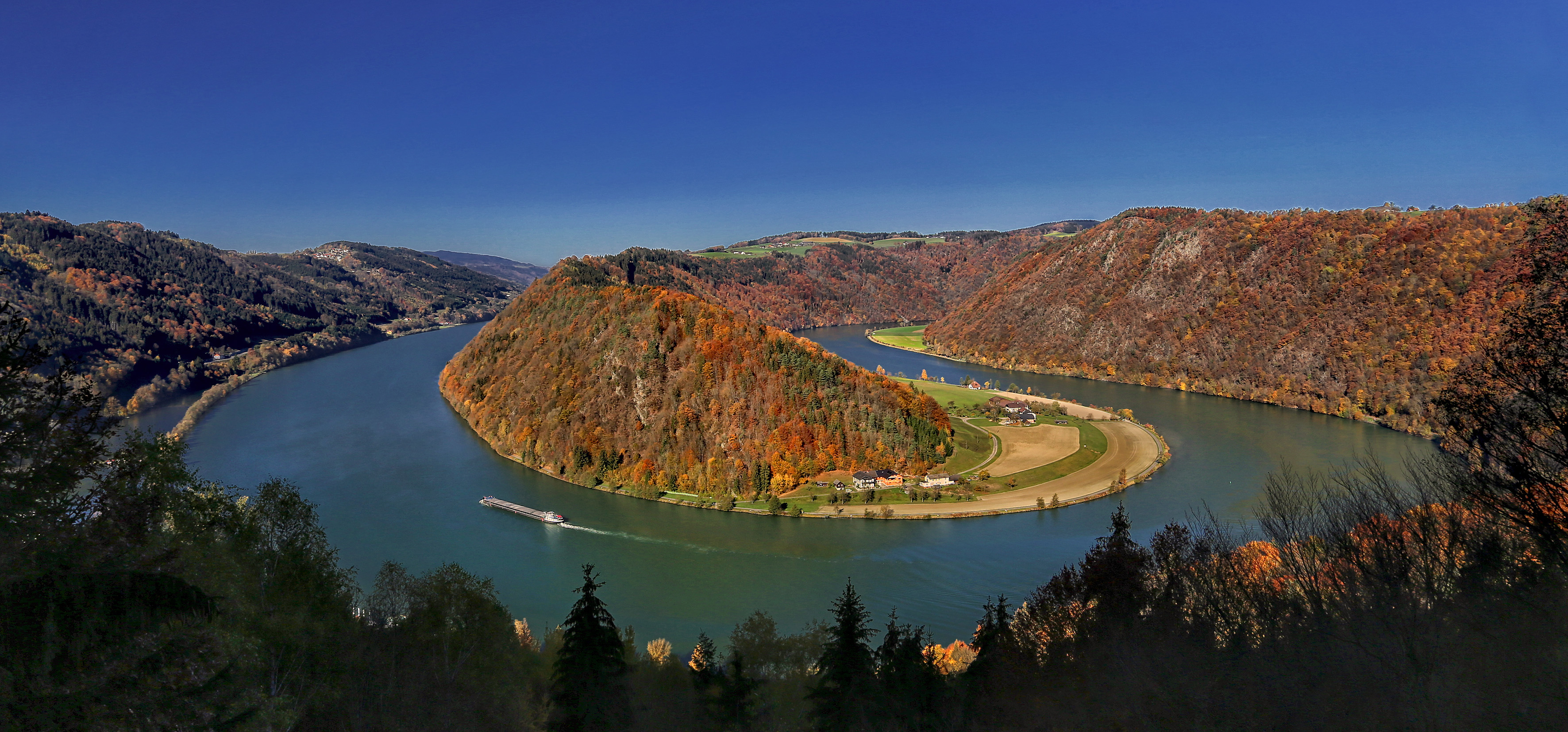 Eine natürliche Flußschlinge der Donau in Haibach / Oberöstereich